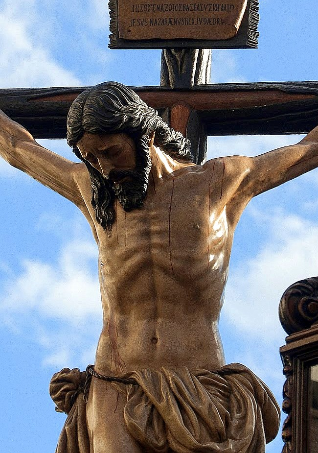 Santísimo Cristo de la Buena Muerte